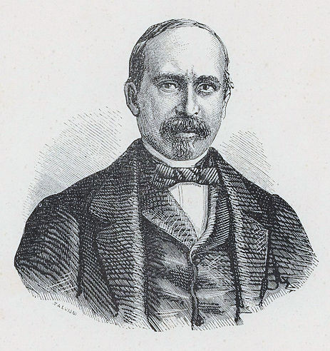 Filippo De Blasio